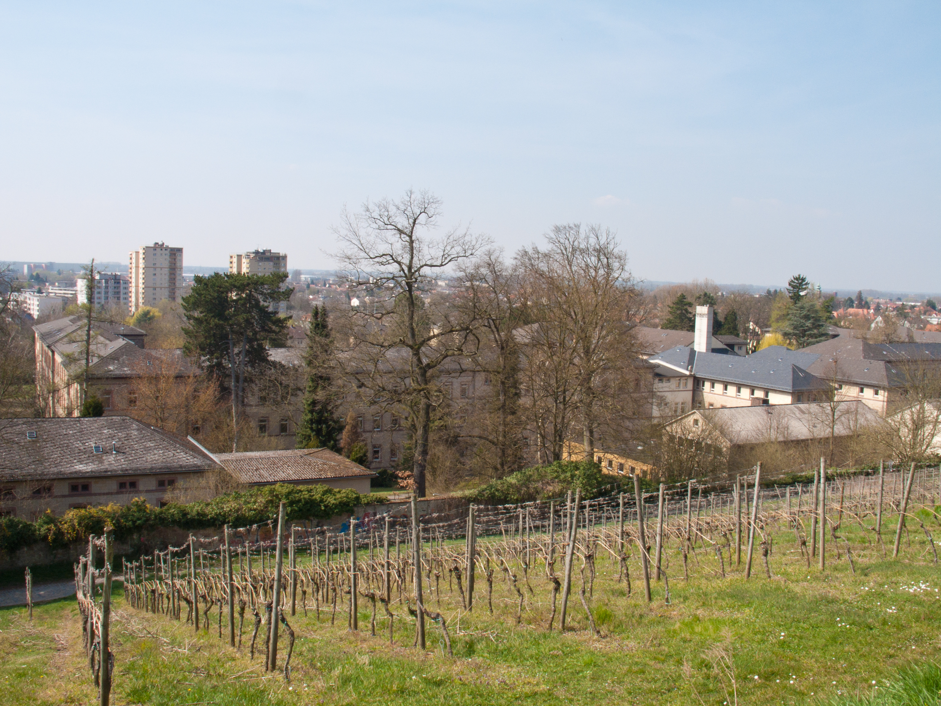 The Bergstraße Sports & Country Club. Ansicht des Areals von den Weinbergen im Osten.